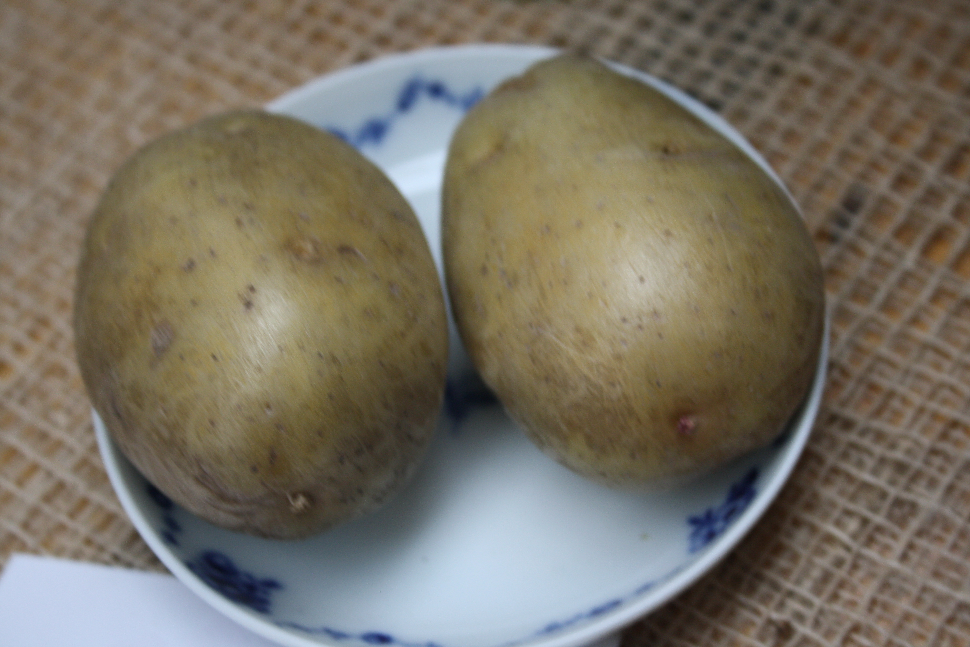 Bild aufgenommen auf dem Apfeltag auf Gut Wulksfelde - Sortenname im Dateinamen laut Beschriftung vor Ort